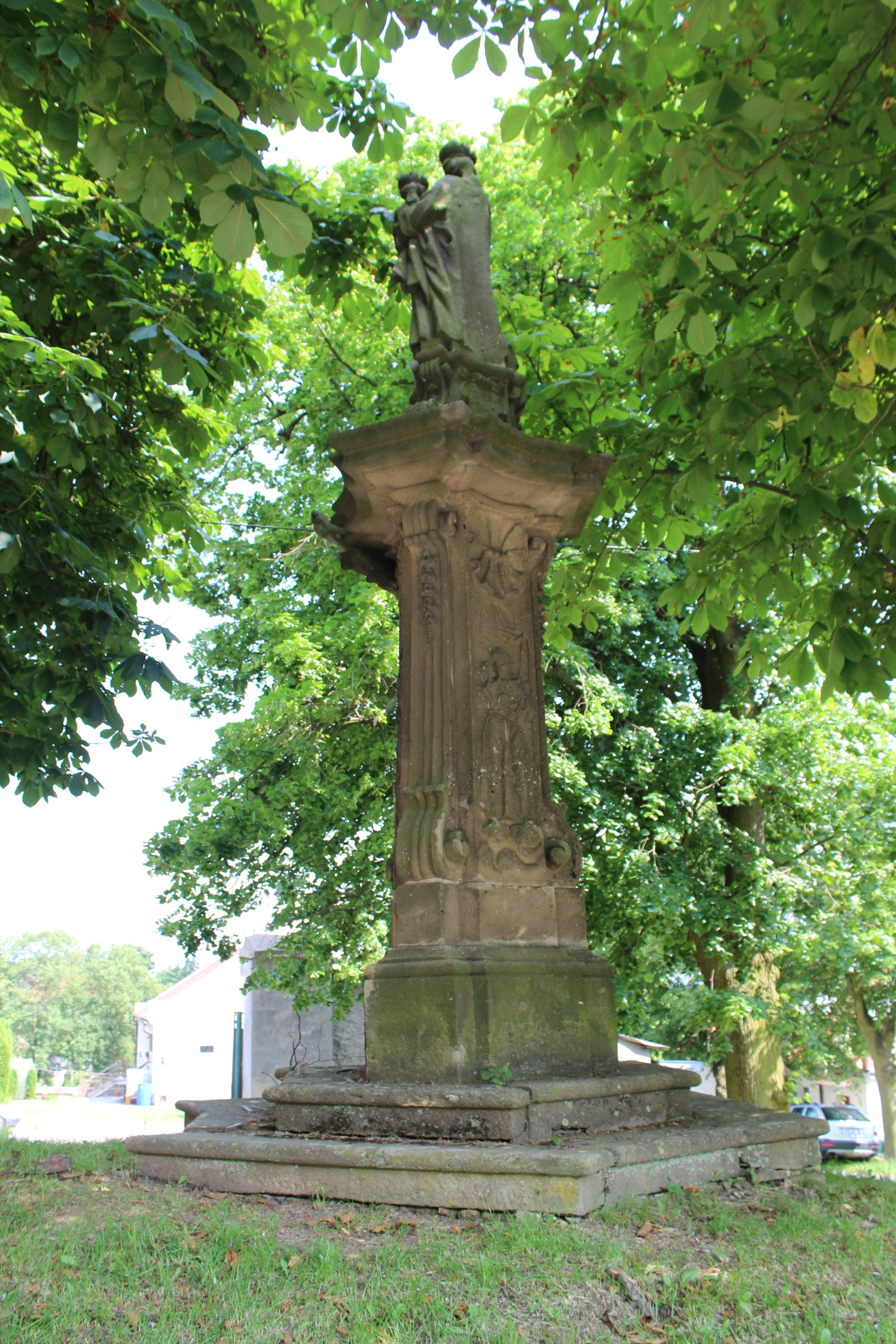 Socha Panny Marie ve Všetatech v rakovnickém okrese.